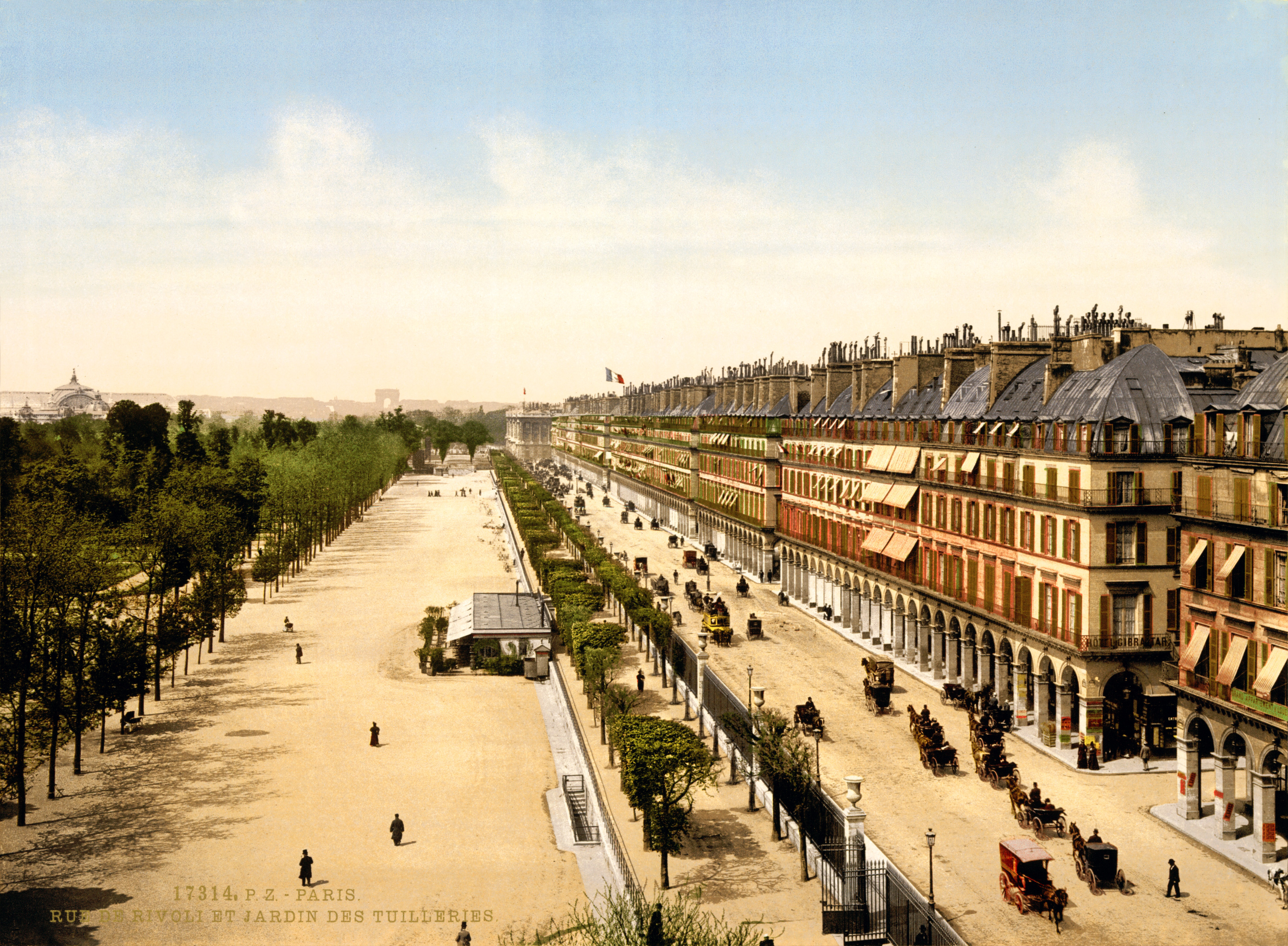 Rue de Rivoli et Jardin des Tuilleries, Paris, 1900. Carte postale 17314. P.Z. - Paris